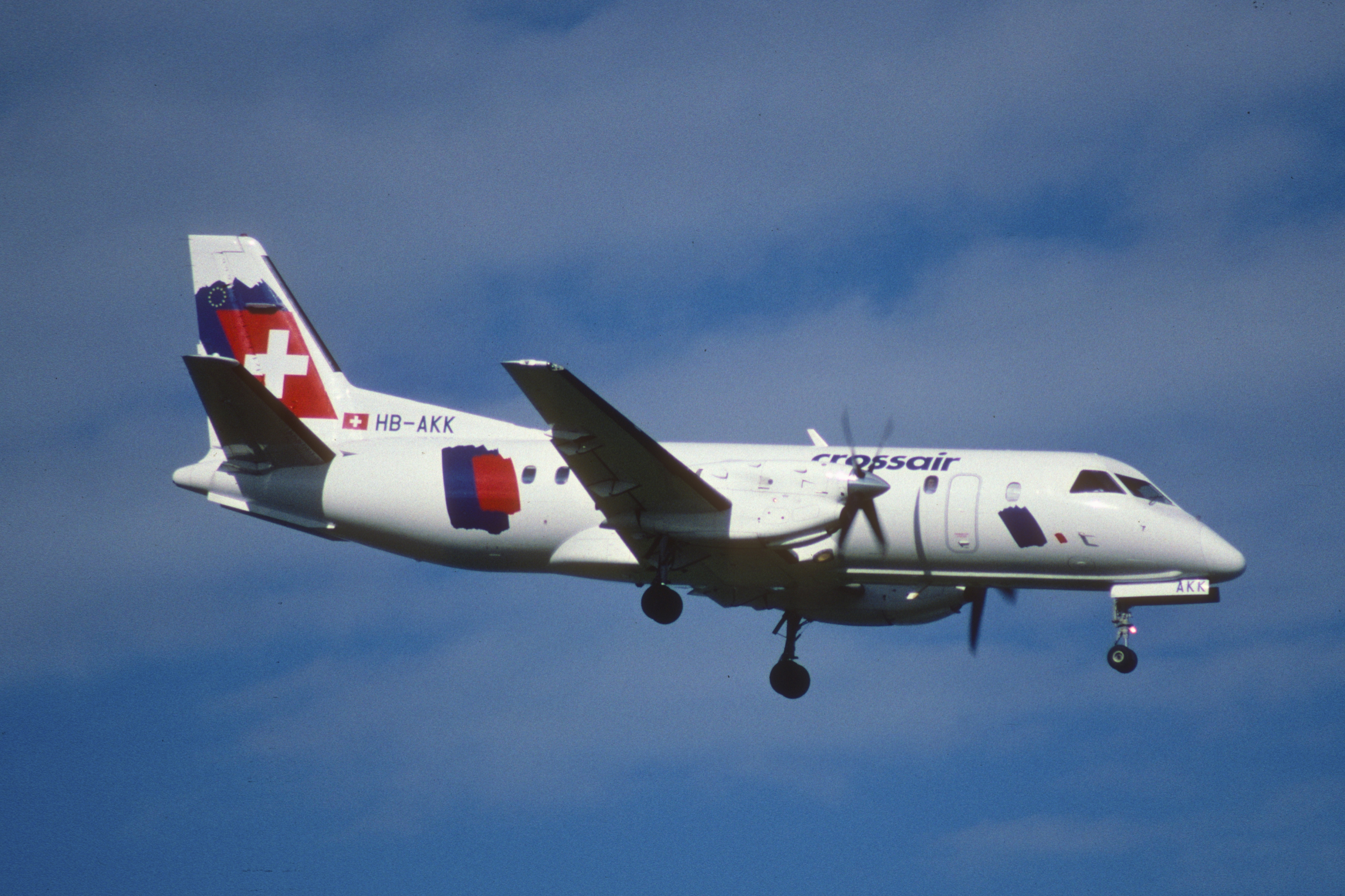 39bb - Crossair Saab 340B; HB-AKK@ZRH;09.09.1998